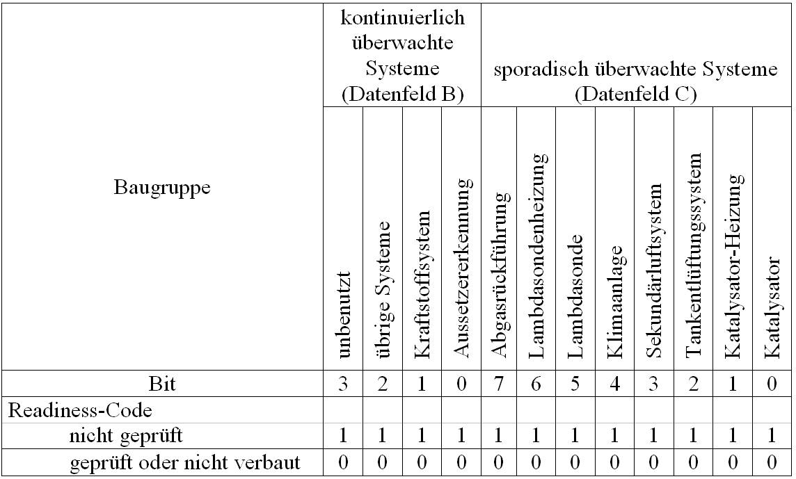 Übersicht der eingebundenen Baugruppen eines Readynesscodes